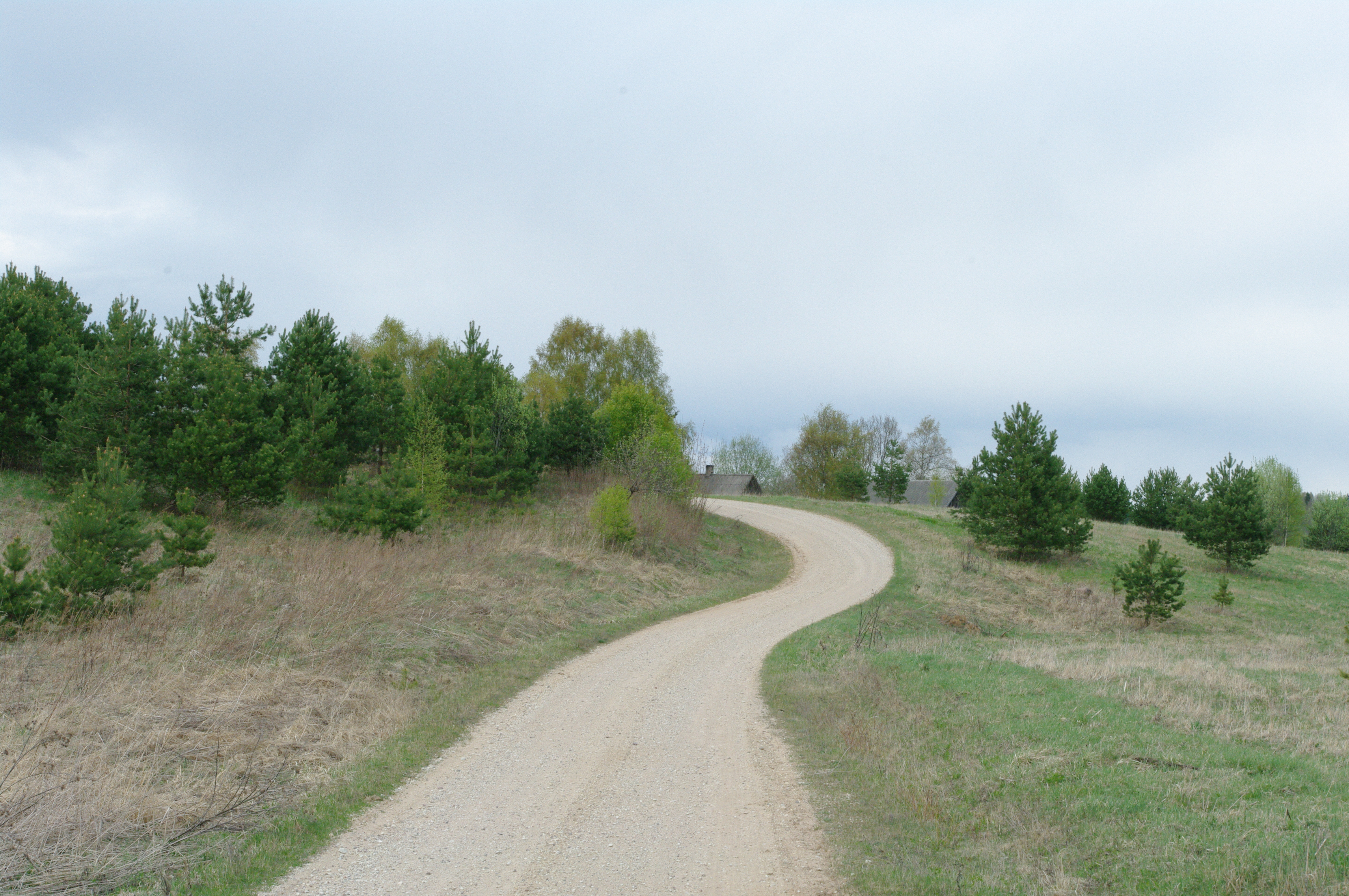 Kruusatee Kurõ küla suunas Misso vallas